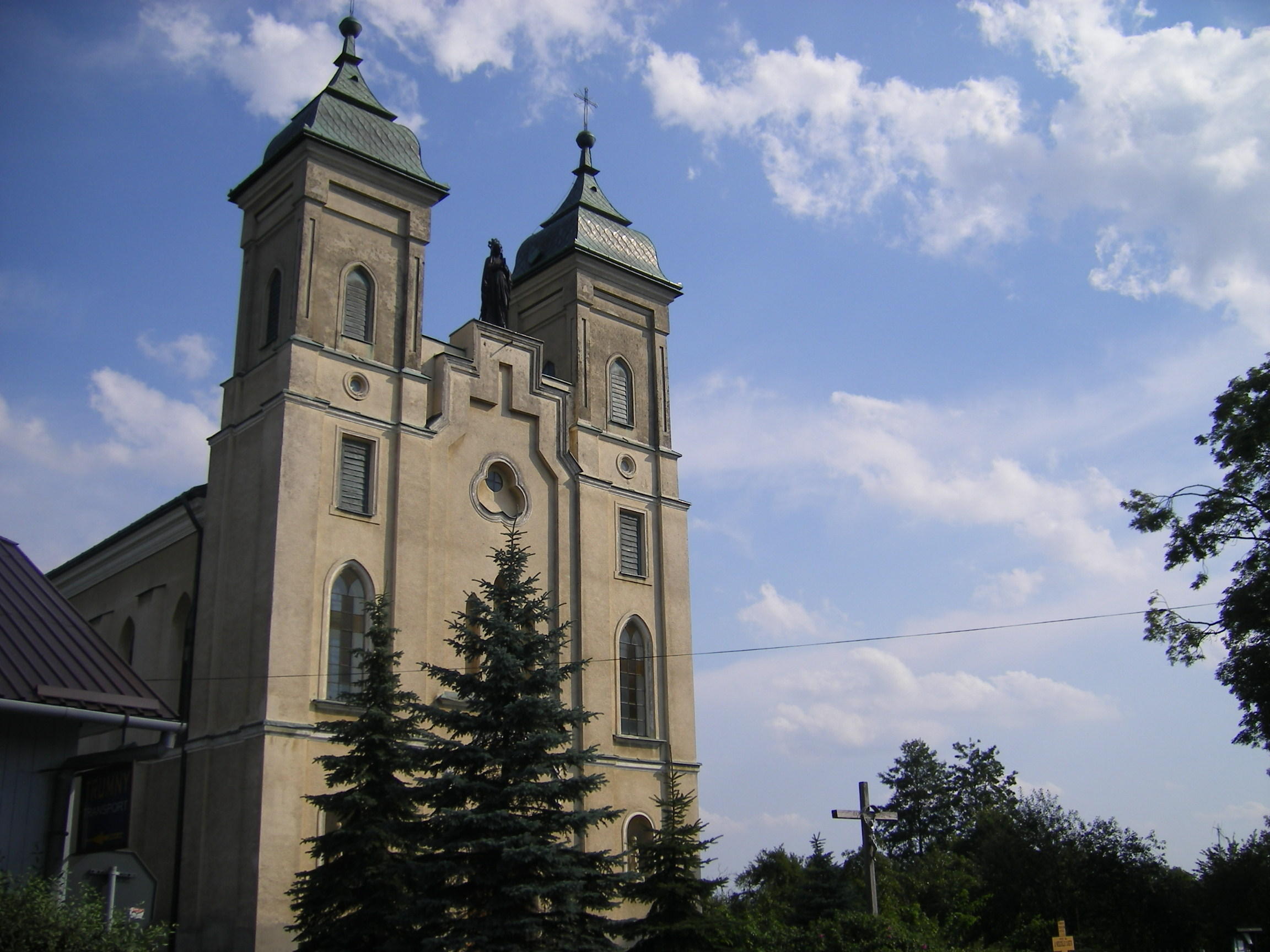 Sokołów Małopolski, Catholic Church